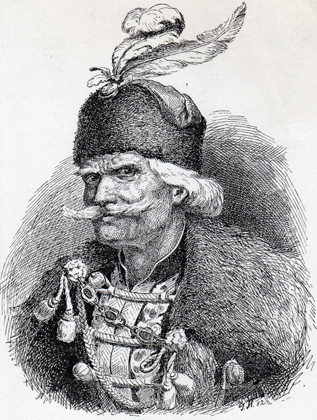 Урош Предић, Старина Новак (рођен јоко 1520. г). цртао по народној песми.